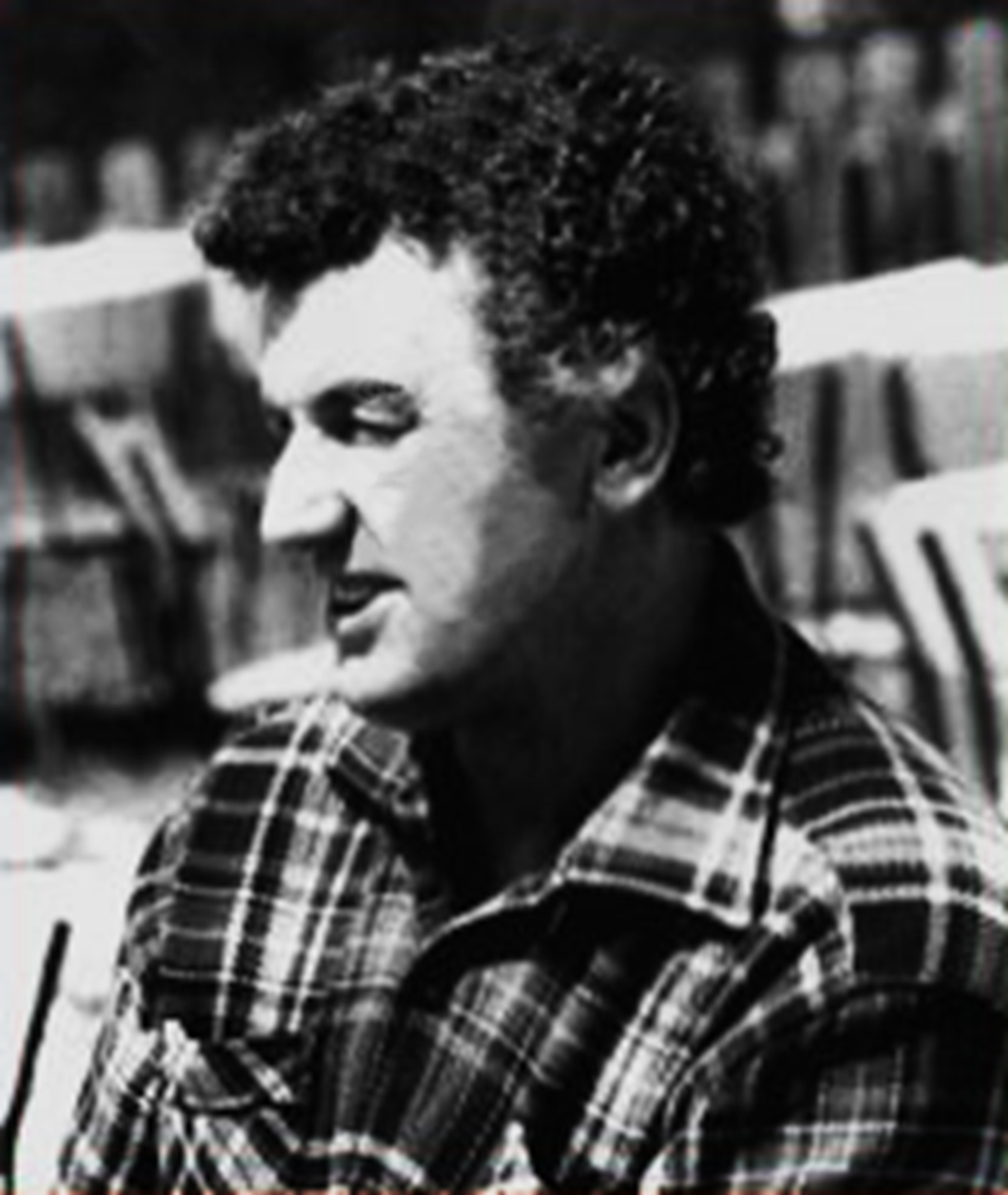 Bruno Cetto, Ingenieur und Mykologe